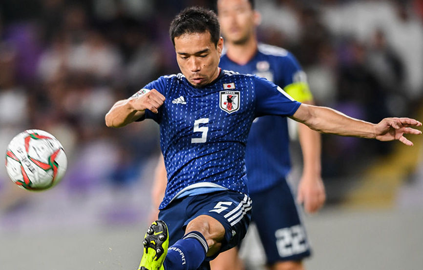 دیدار تیم‌های ملی فوتبال ایران و ژاپن دیدار تیم های ملی فوتبال ایران و ژاپن در مرحله نیمه نهایی هفدهمین دوره جام ملت های آسیا ۲۰۱۹ امارات ، با برتری ۳ بر صفر ژاپن در ورزشگاه بن زاید شهر العین برگزار شد.